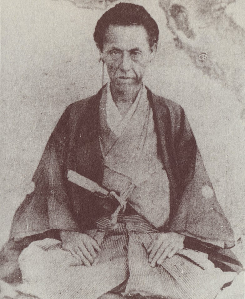 大老酒井忠績の肖像。